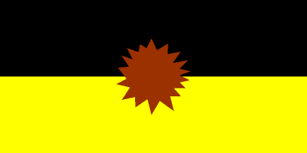 Bandera del cantón Yacuambi